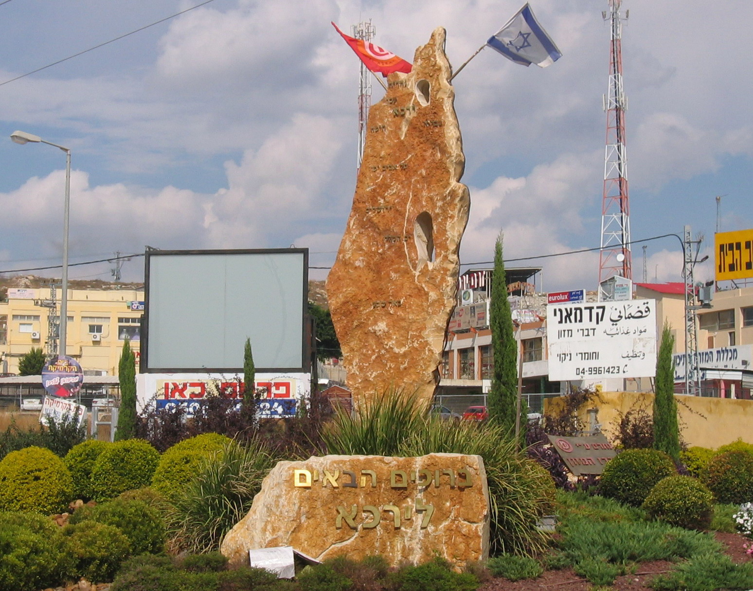 Yirka, Israel